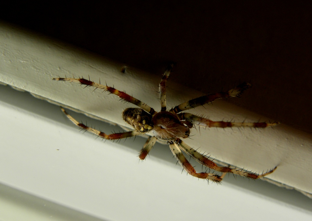 Krzyżak ogrodowy - samiec